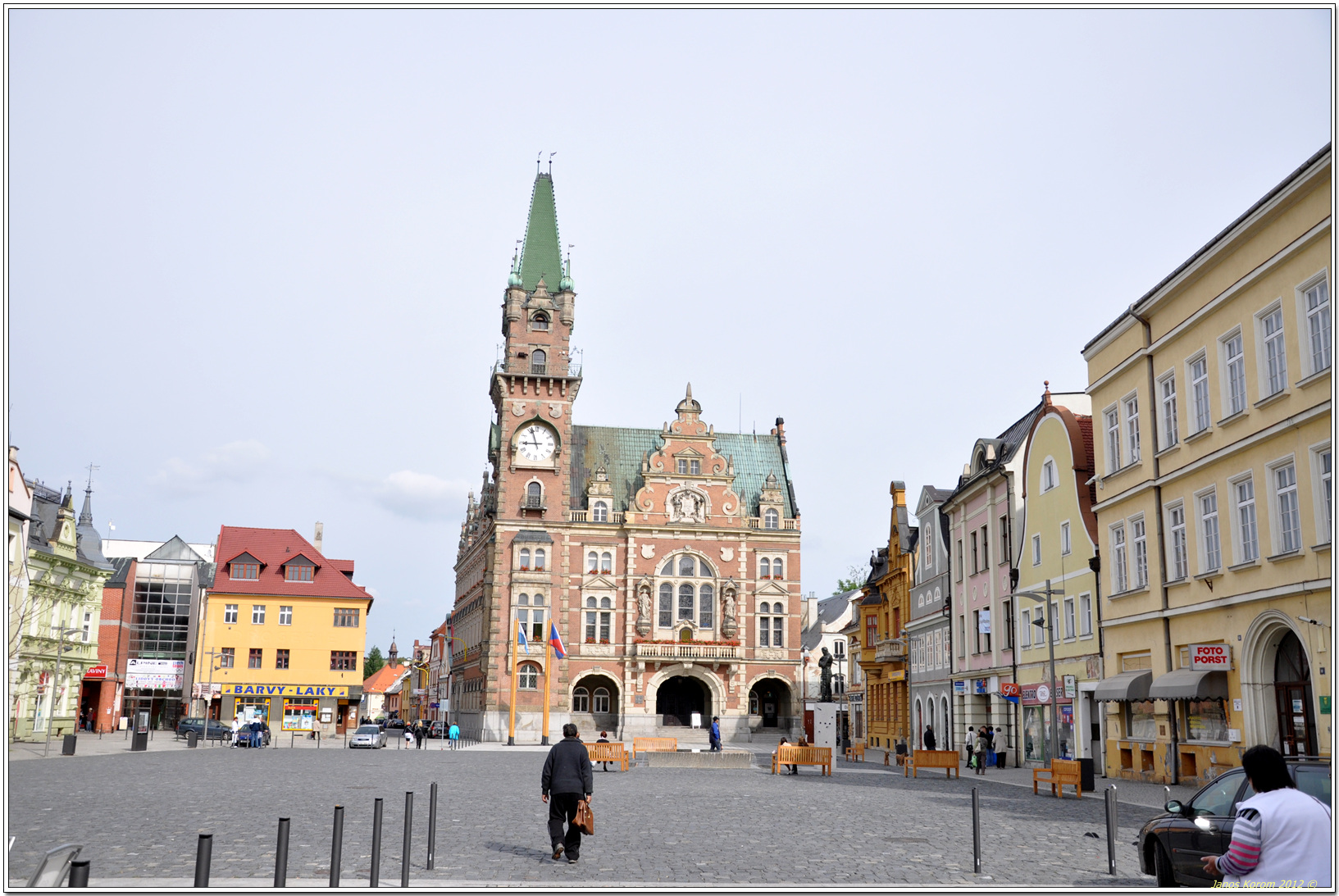 Marktplatz - Rathaus